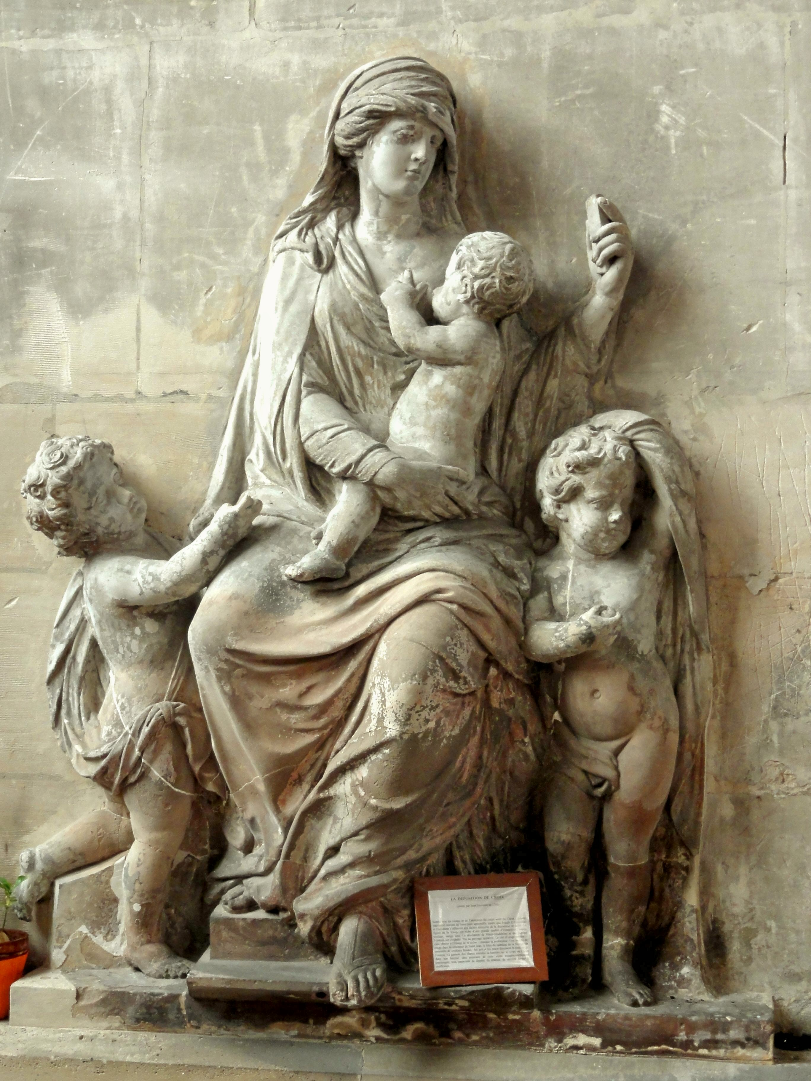 Dans la chapelle-porche au bout du collatéral sud, groupe sculpté La Charité par Granier (1635-1715) pour le tombeau de François de Guénégaud, réalisée vers 1688.